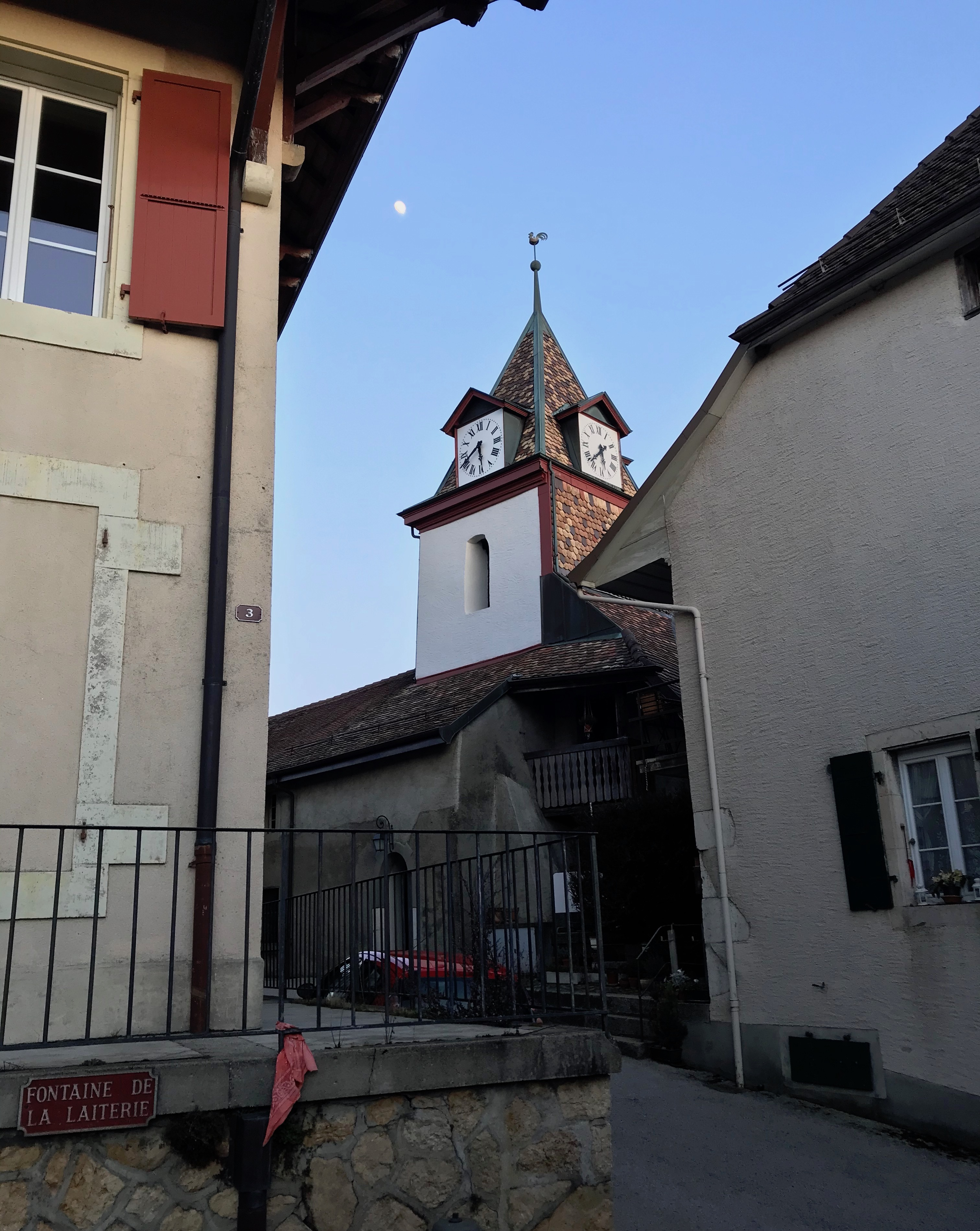 L'église protestante de Saint-Livres (VD) vue depuis la fontaine de la laiterie.